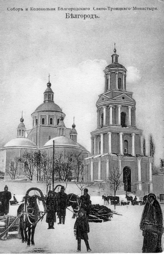 Вид на Свято-Троицкий собор Белгорода в начале XX века